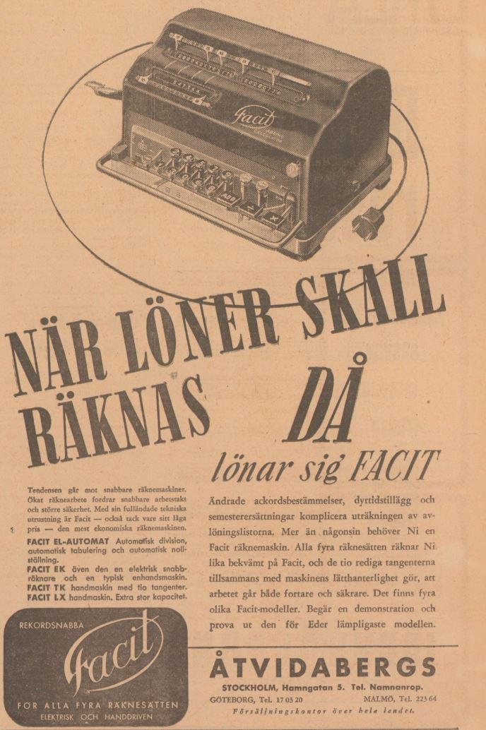 Reklamannons för Facits räknemaskiner 1941, modellerna Facit el-automat, Facit EK, Facit TK och Facit LX.